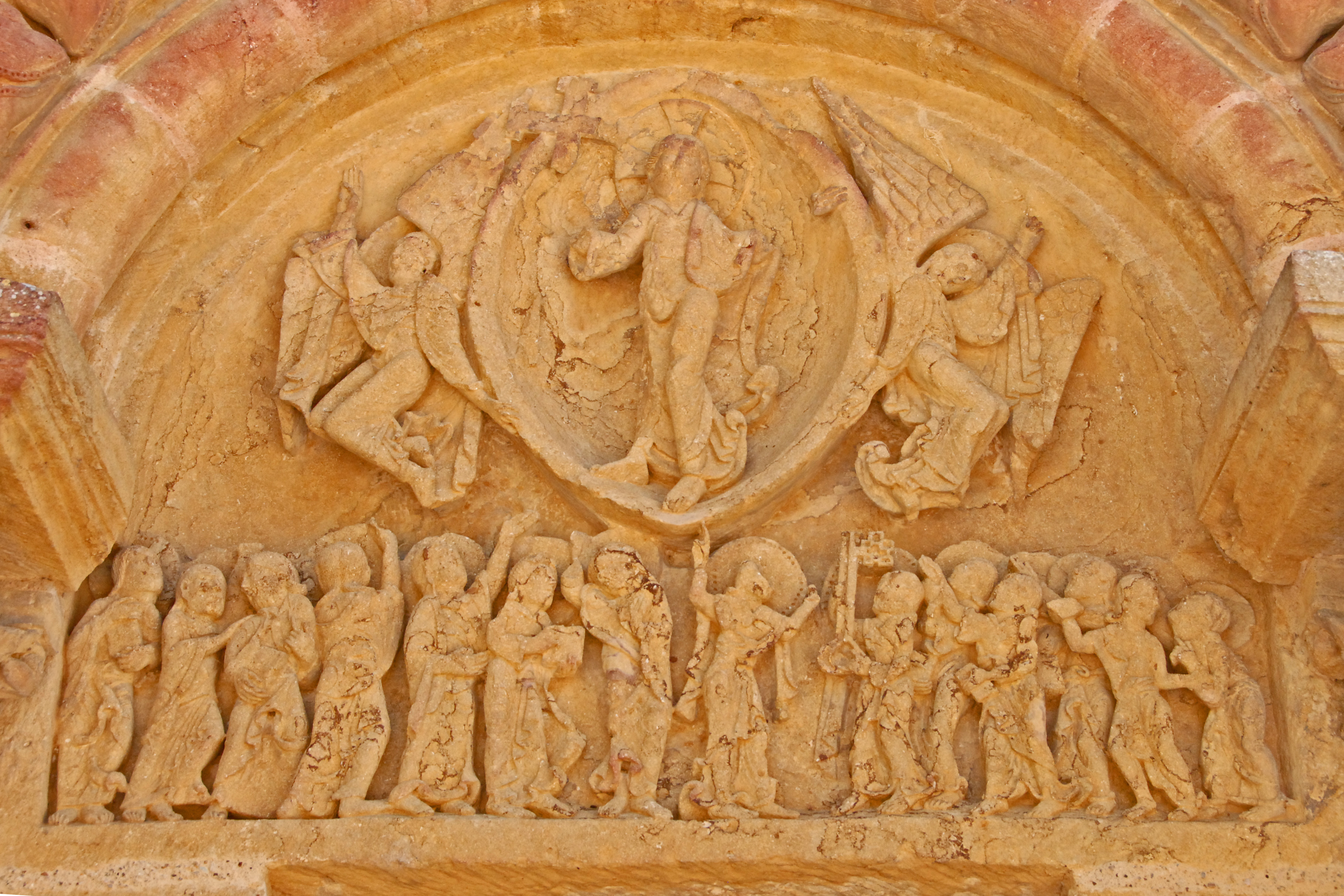 Sts-Pierre-et-Paul de Montceaux-l'Étoile, Tympanon